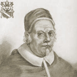 H.H. Pope Alexander VIII